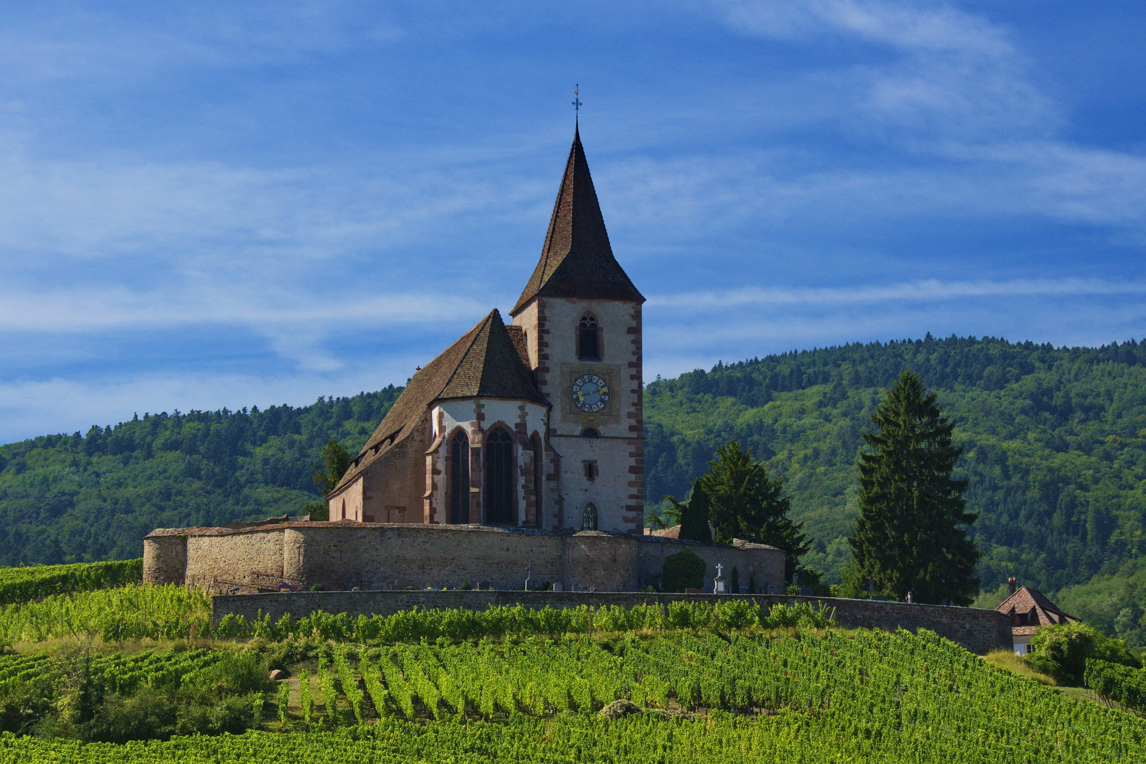 Église mixte Saint-Jacques-le-Majeur, classée 1972 .